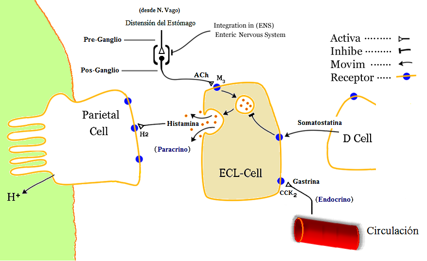 Regulación funcional de la célula ECL. Aferencias, receptores, eferencias.